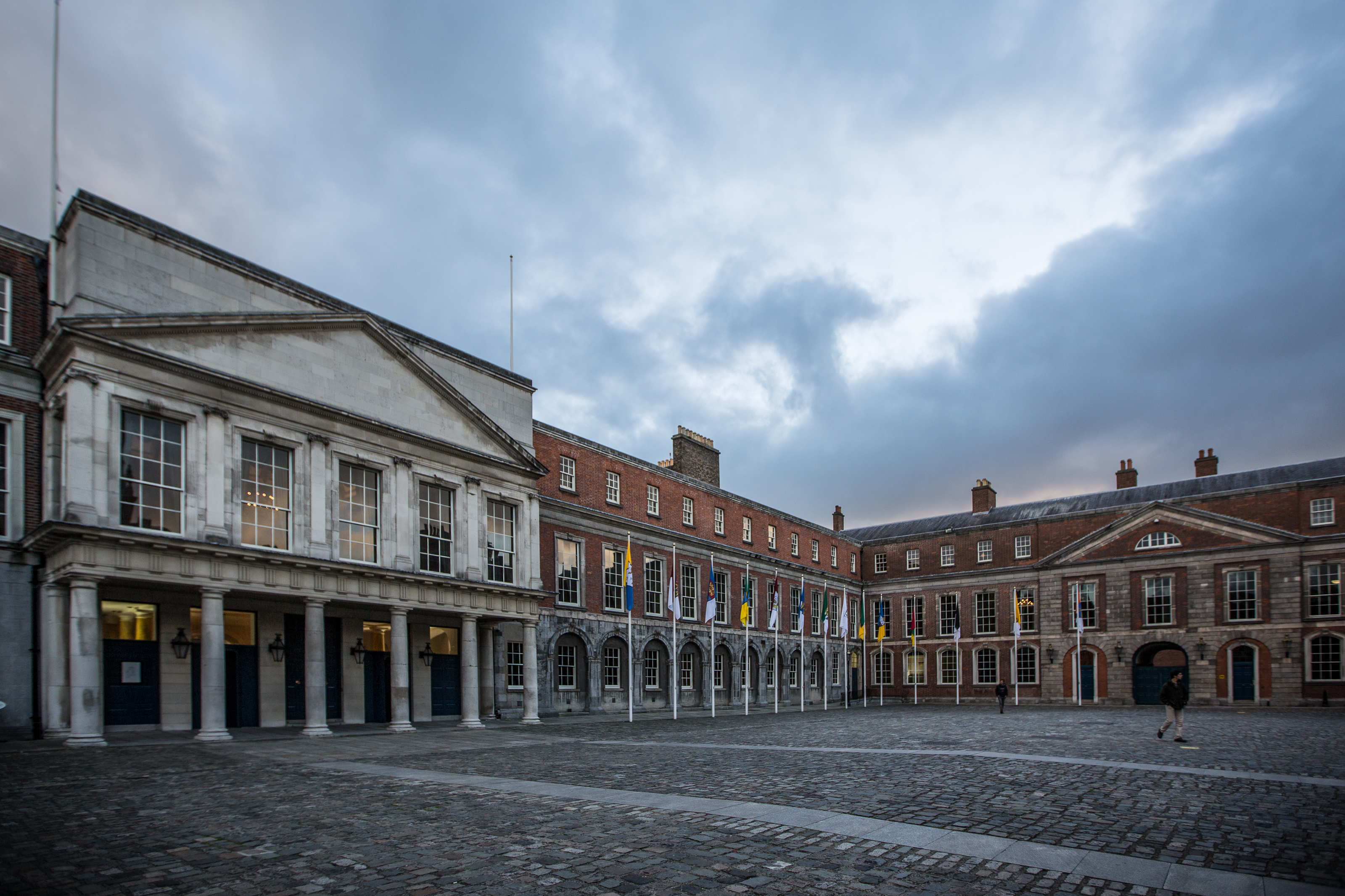 Dublin